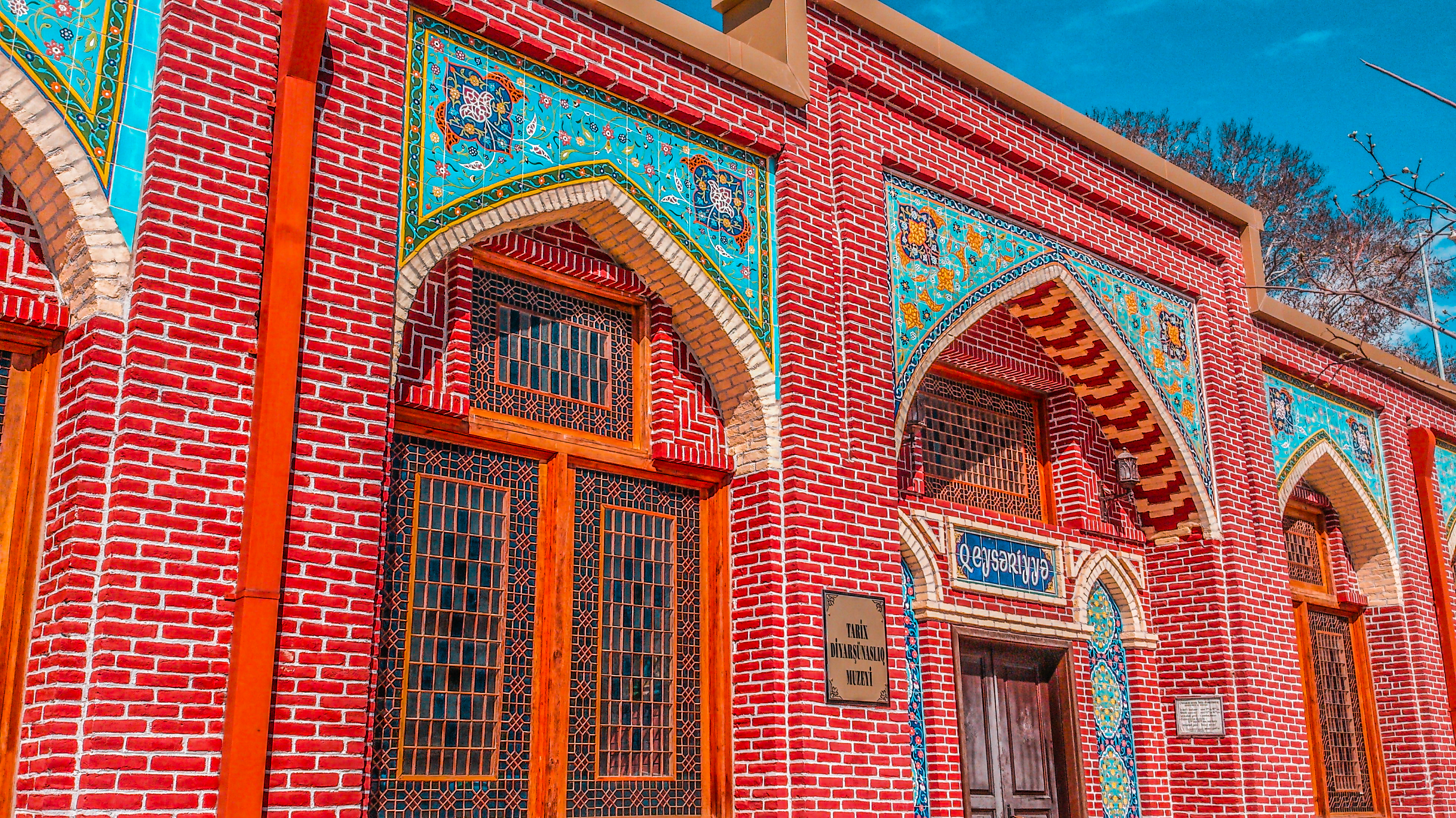 ordubad